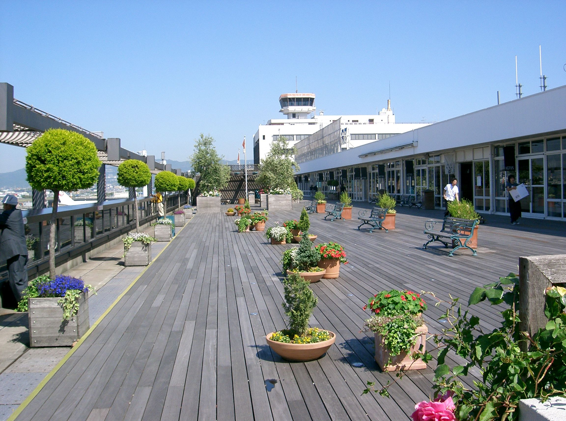 大阪国際空港